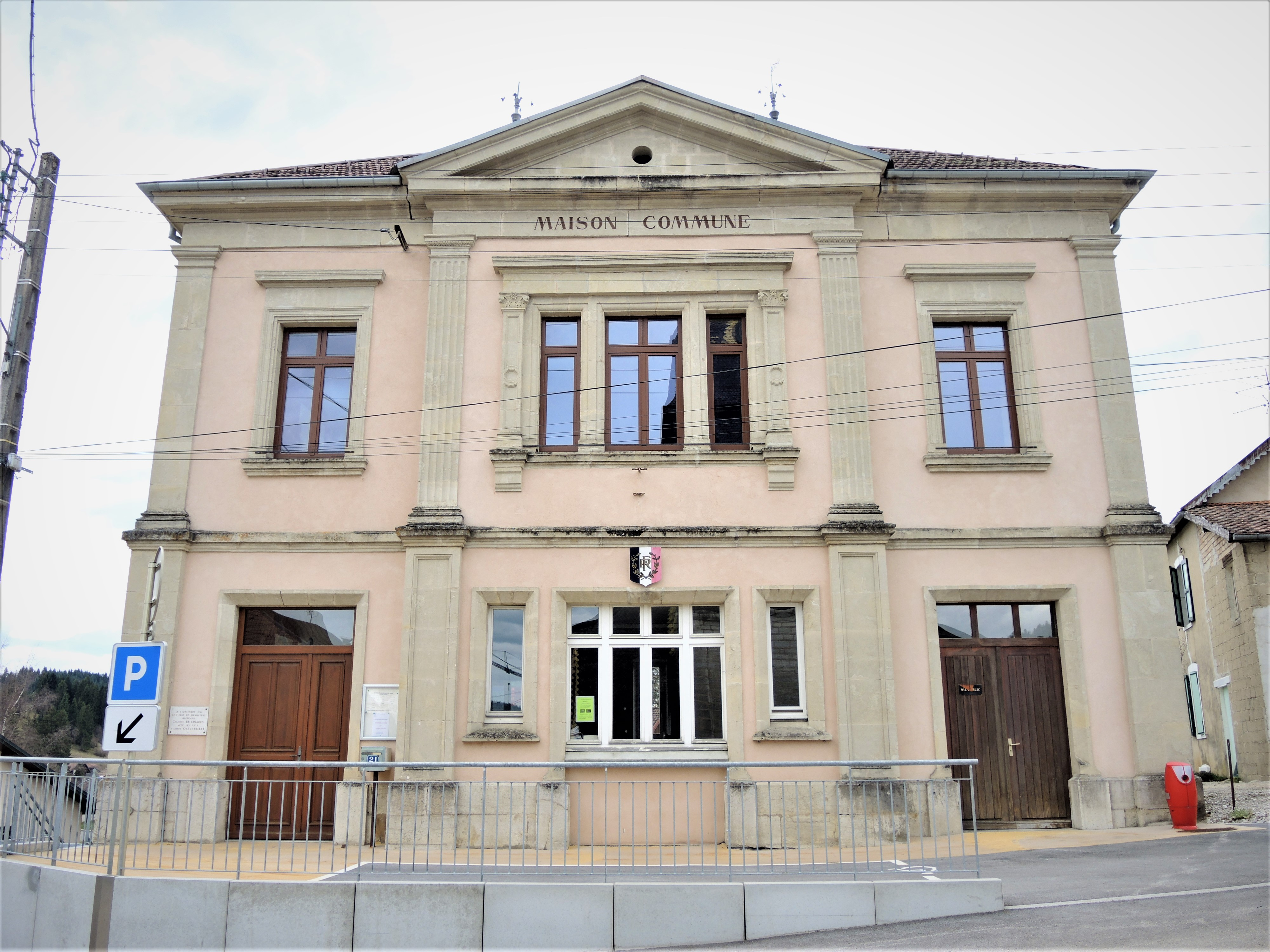 Façade de la mairie d'Oye-et-Pallet. Doubs